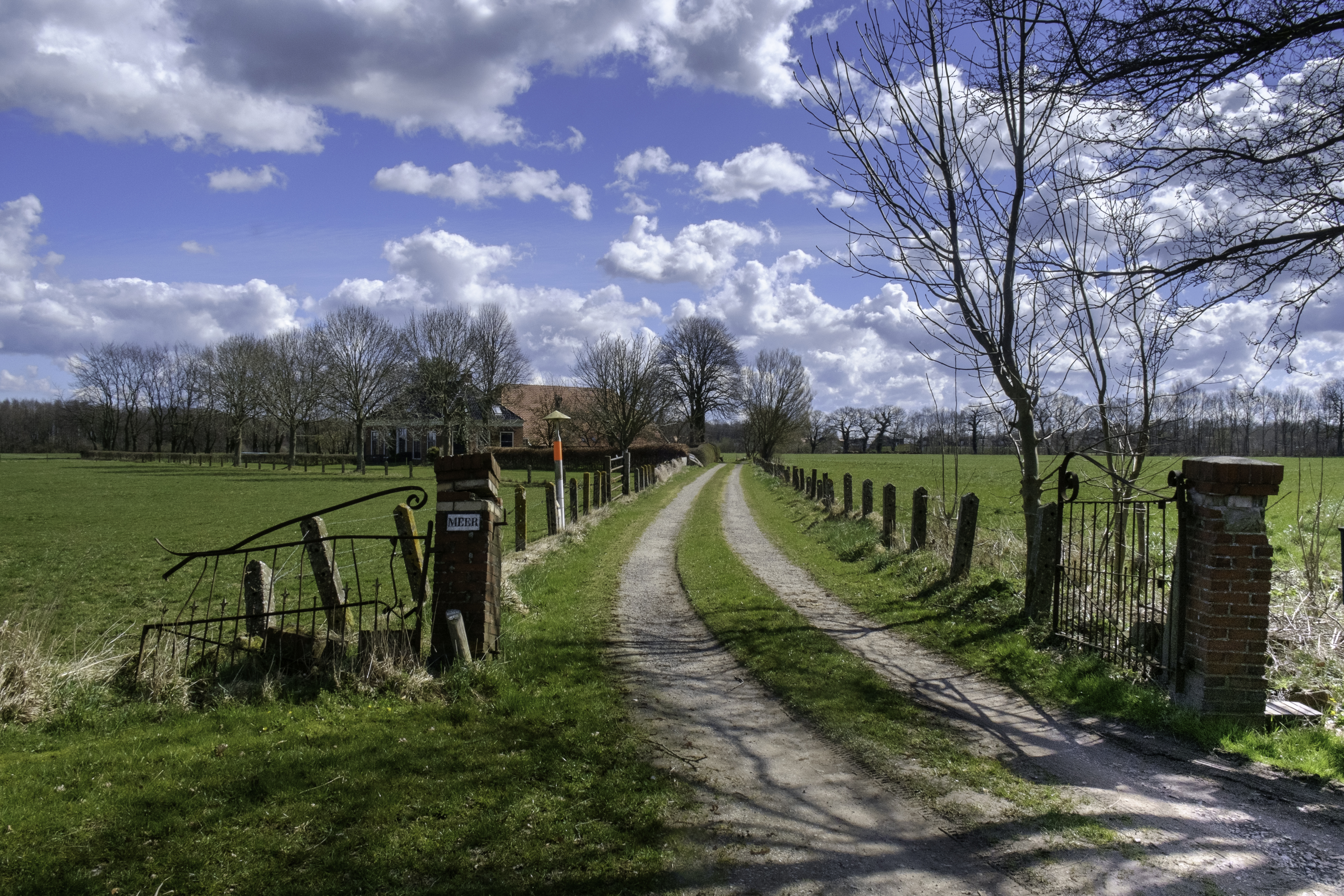 Ingang naar Meerlust